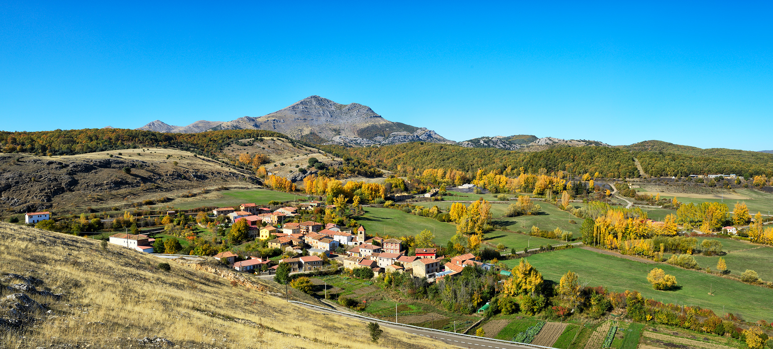 Panorámica de Prado de la Guzpeña en otoño con el pico de Peñacorada al fondo.